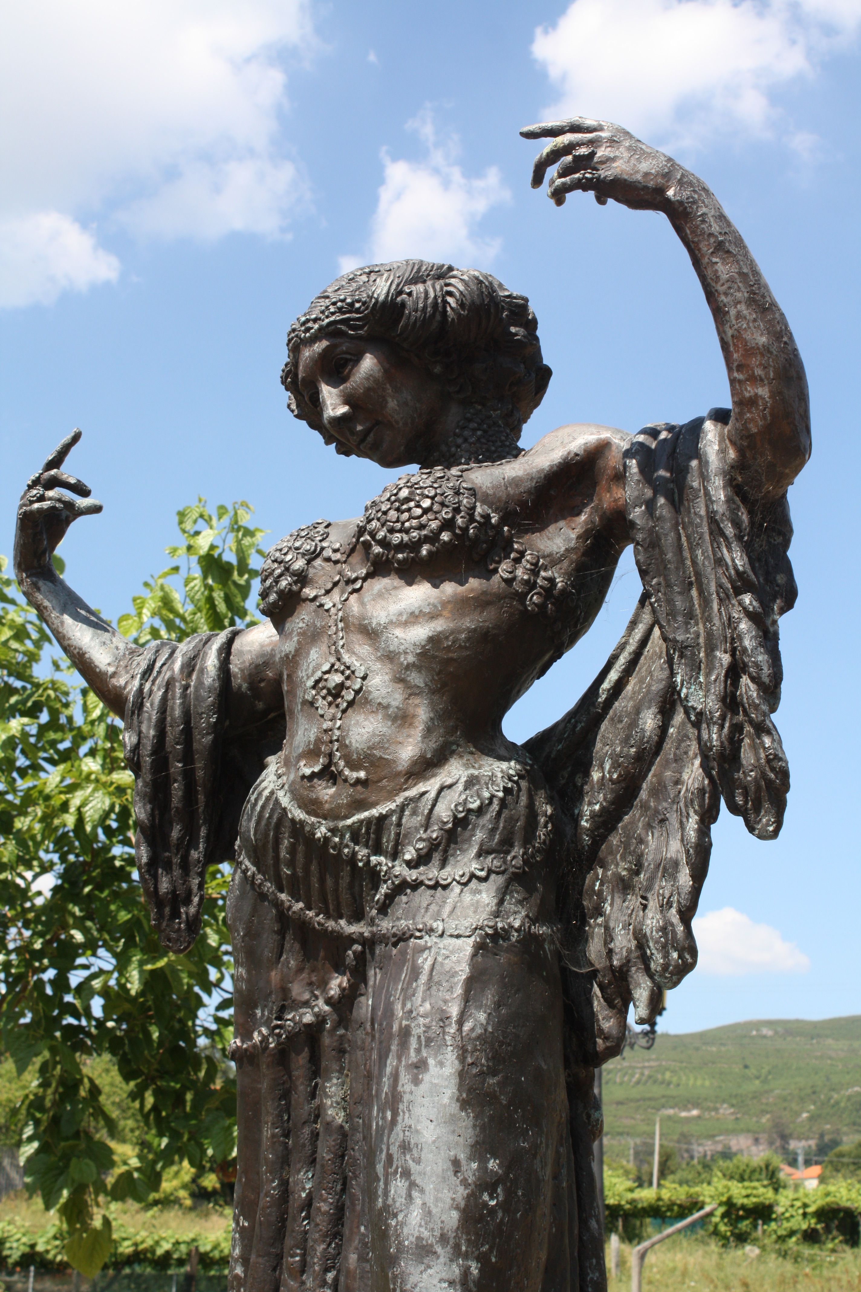 A Bela Otero, Valga, Pontevedra